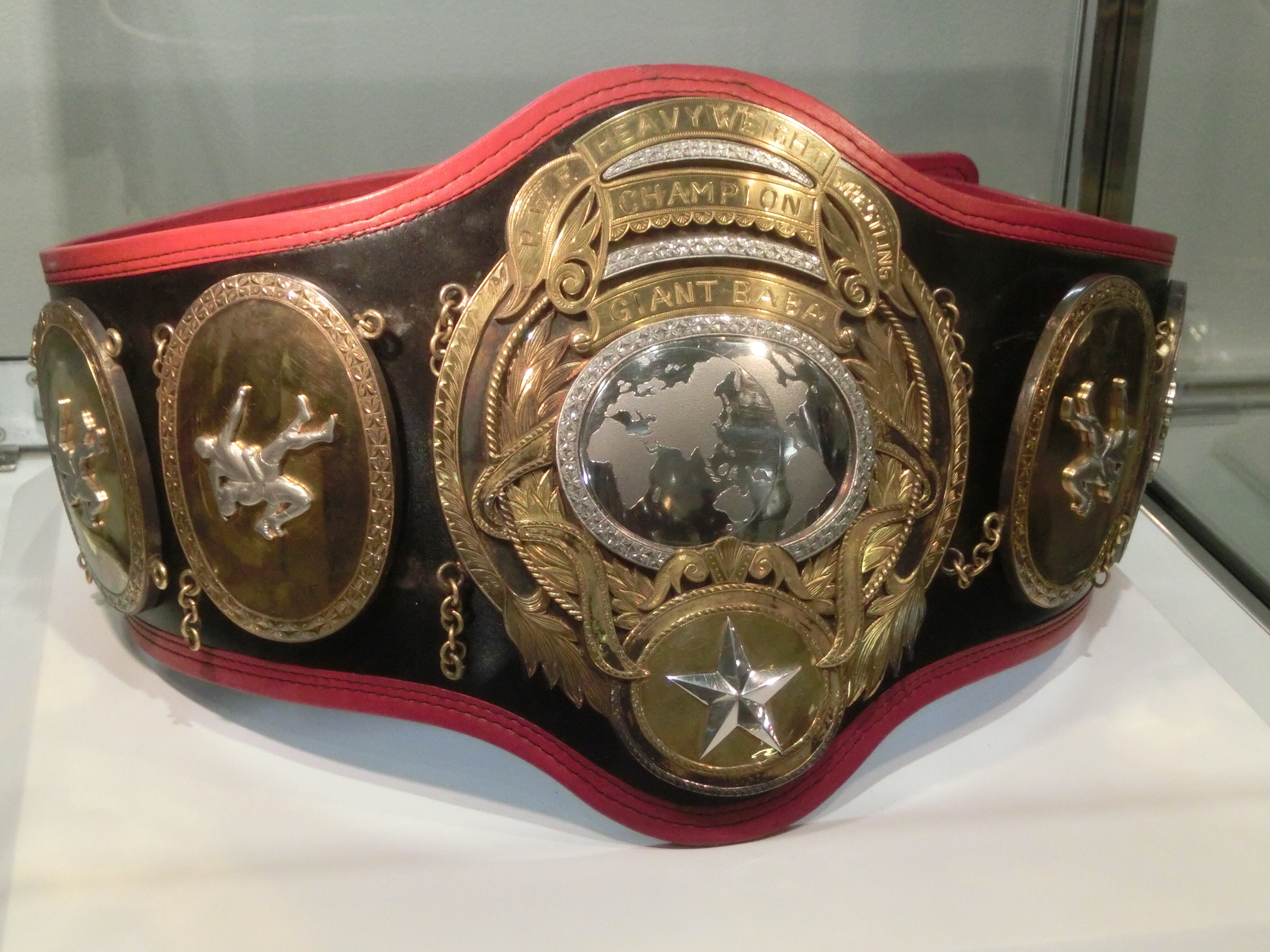 PWFヘビー級王座（1972年制作）渋谷「ジャイアント馬場 20thメモリアル. ～ジャイアント馬場展」撮影（2019年）